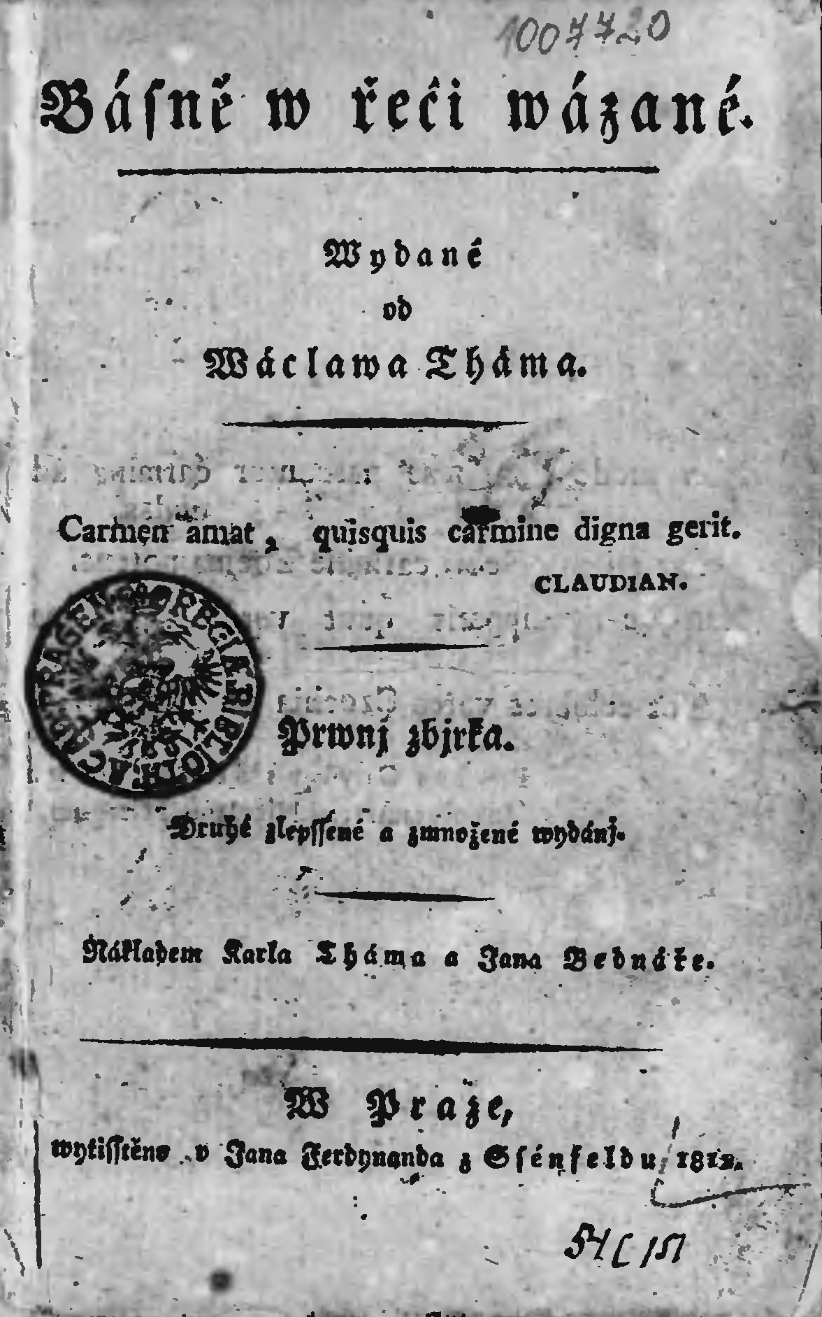 Václav Thám: Básně v řeči vázané (titulní strana)